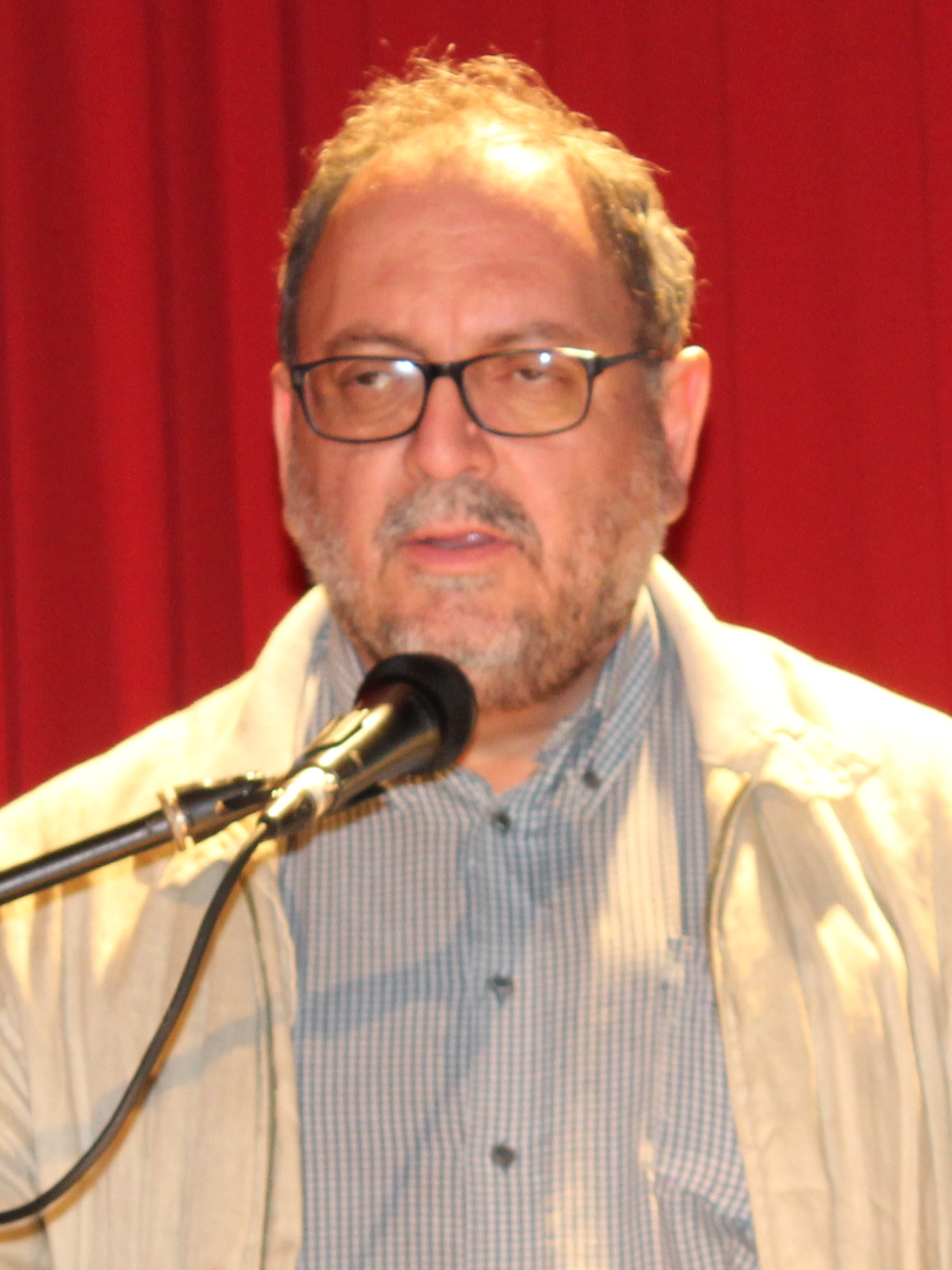 Fernando Rivas Inostroza en la presentación del libro Colchagua en Desconcierto, de Diego Grez-Cañete, en el Centro Cultural de San Fernando